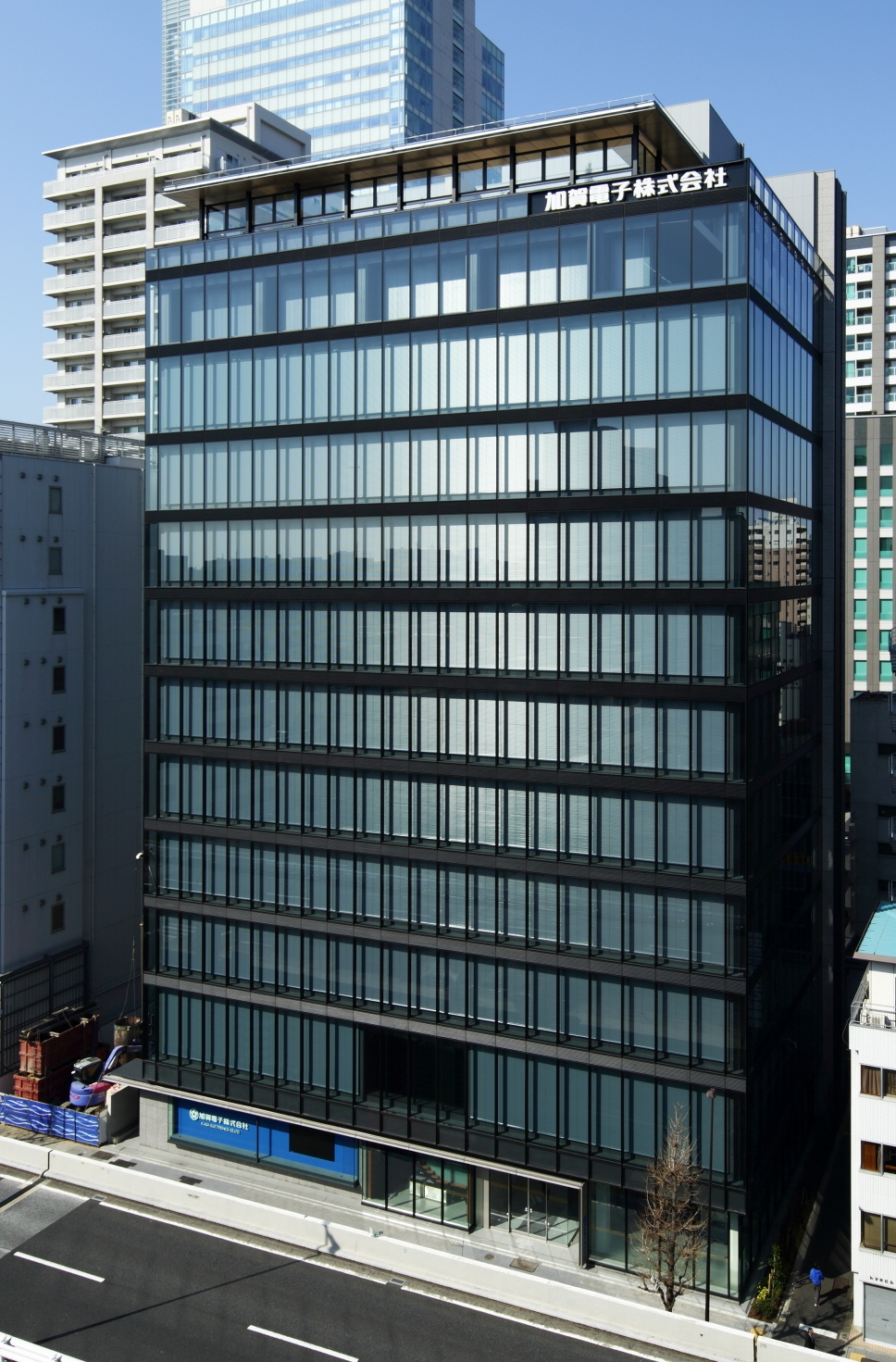 加賀電子本社ビル